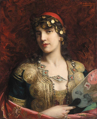 L'Orientale. Huile sur toile.